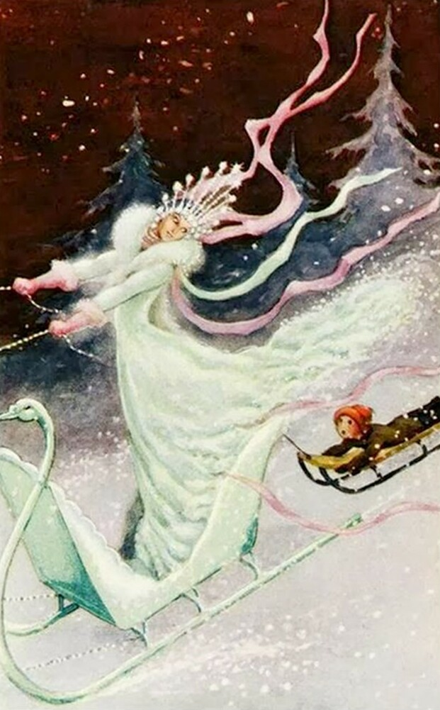 Rudolf Koivun kuvitusta H. C. Andersenin satuun Lumikuningatar. Julkaistiin vuonna 1992 osana kokoelmaa Rudolf Koivun satuja ja tarinoita, jossa tämä oli myös kansikuvana.